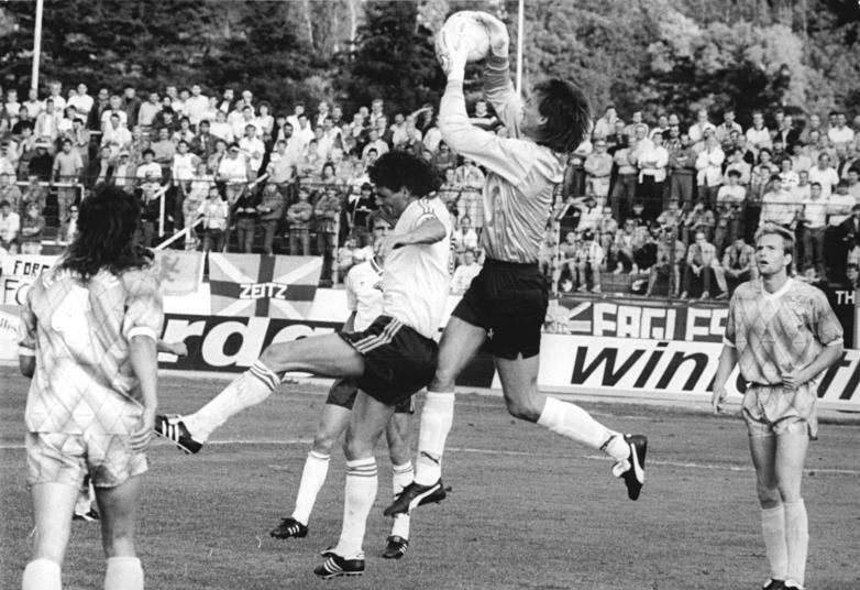 ADN- Ralf Hirschberger-17.8.90-Jena: Fußball-Oberliga FC Carl Zeiss Jena - FC Hansa Rostock 0:3 (0:0) Vor nur etwa 3.000 Zuschauern rettet hier der Rostocker Torwart Jens Kunath.